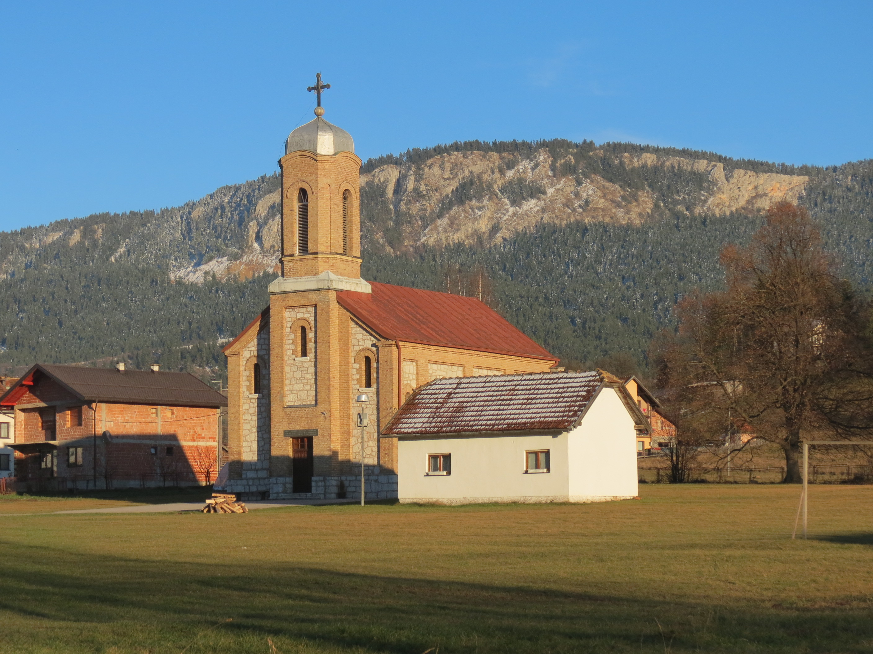 Church of Pustopolje